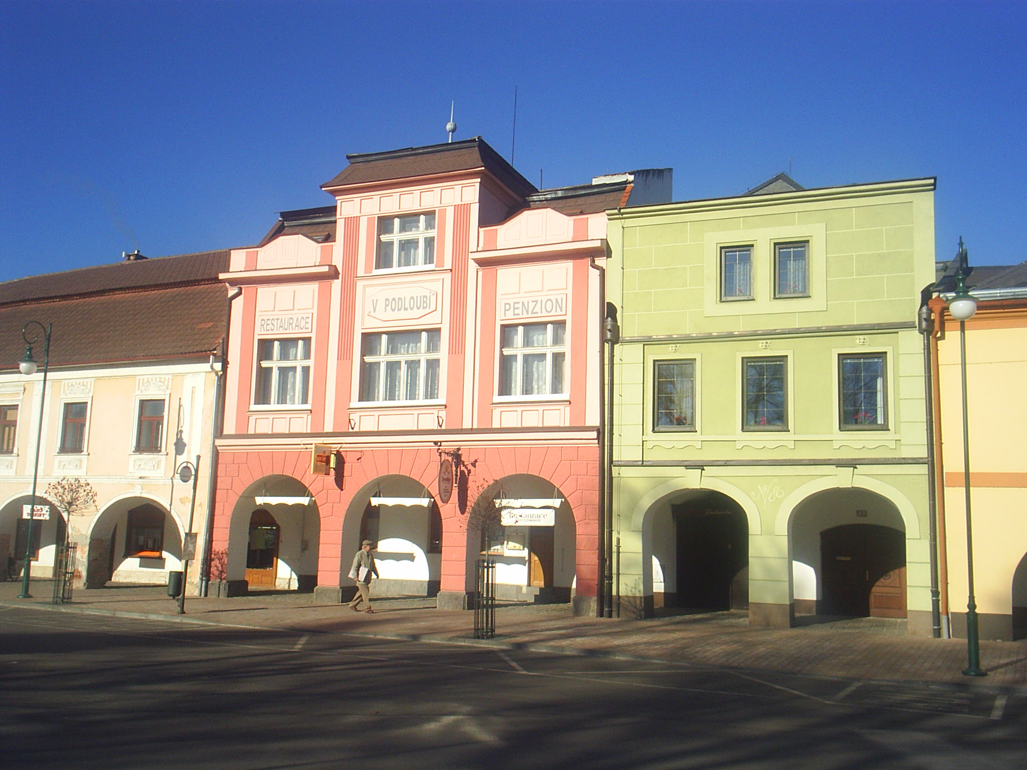 Netolice - dům na náměstíEsperanto: Netolice - domo sur la placo